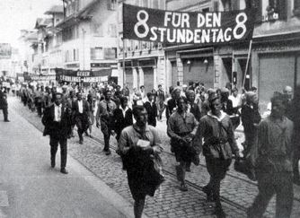 Juso an einer Demo für den Achtstundentag Public Domain gemäss SR 231.1 Art. 31 [1]